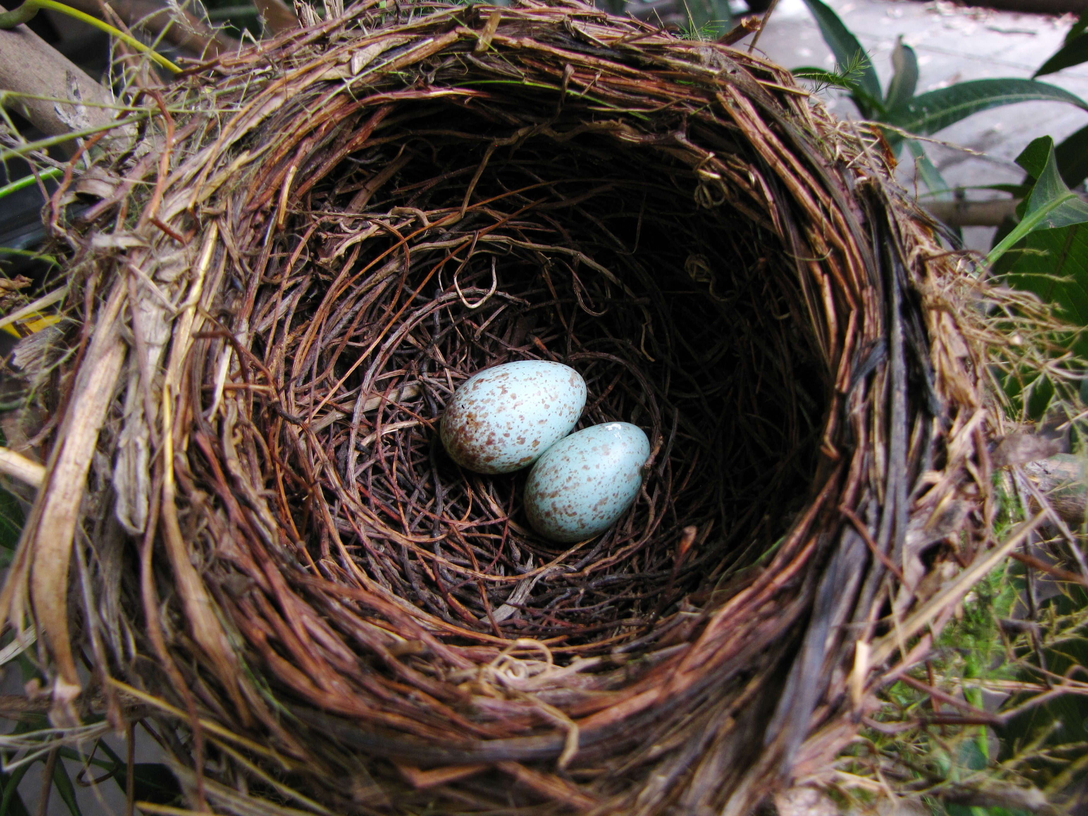 Lugar / place / lieu : Cagua, Estado Aragua, Venezuela.